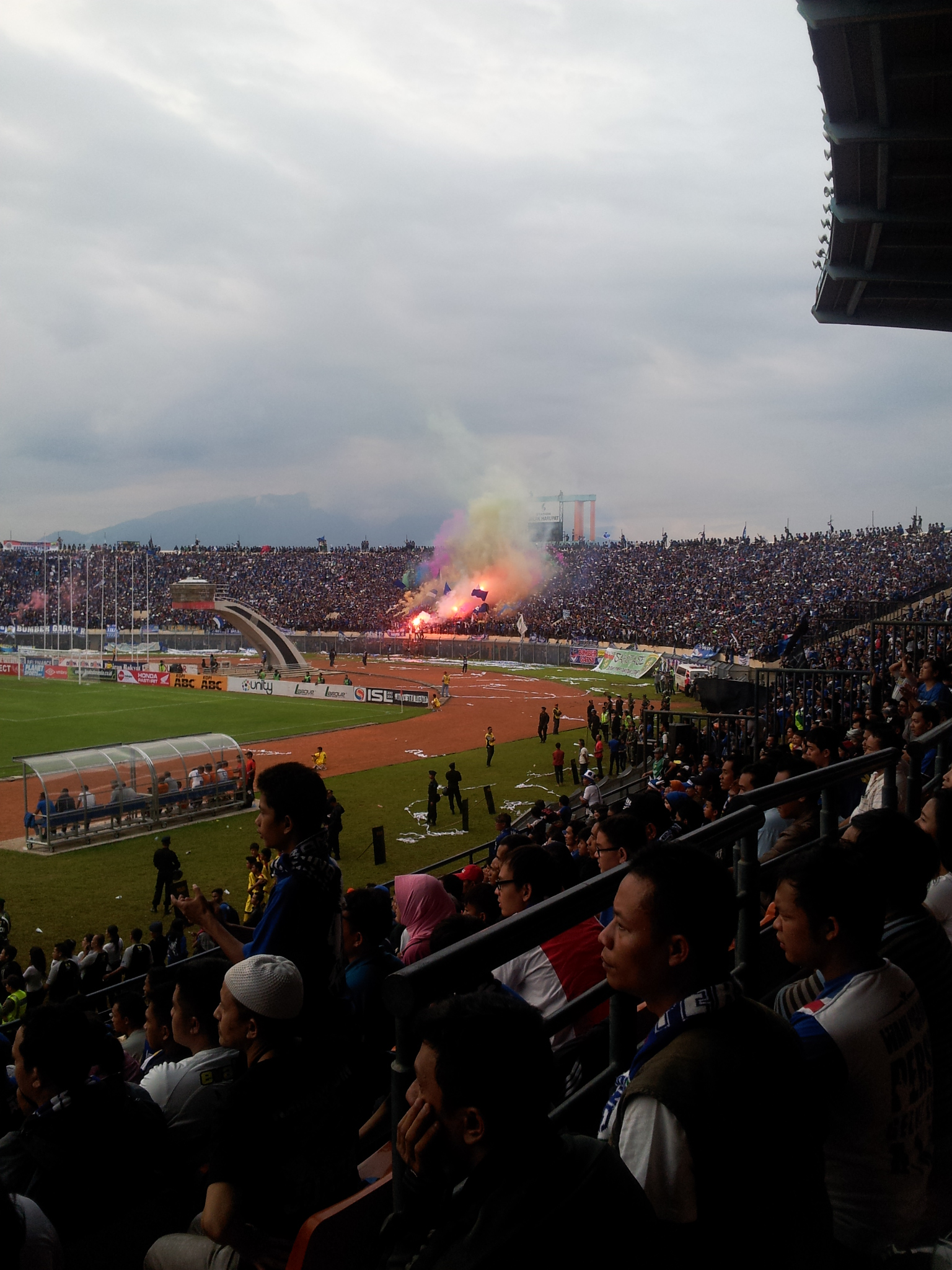 Bobotoh (Indonesian football supporters) during a match Persib vs Arema in Si Jalak Harupat Stadium, Bandung.